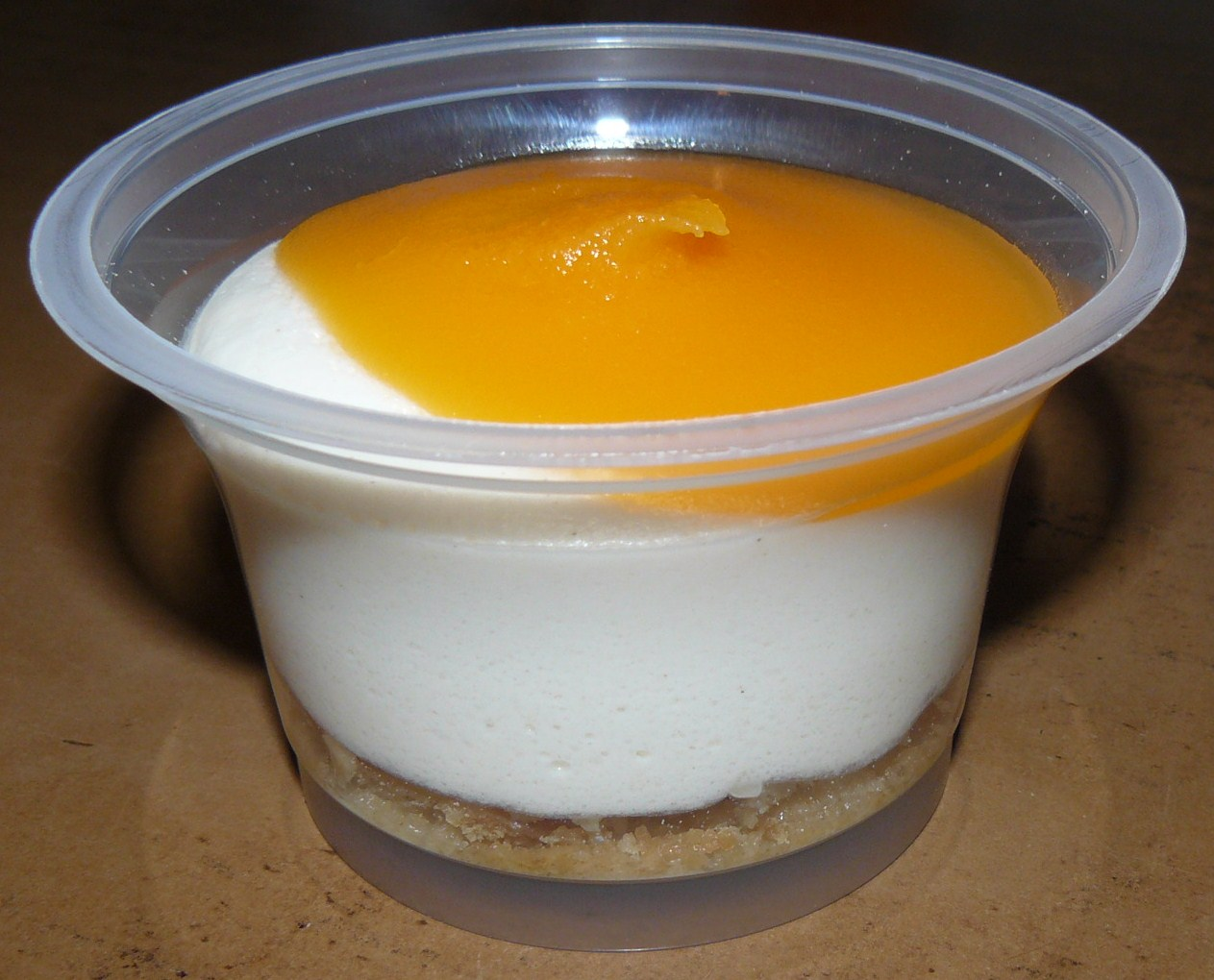 Natas do Céu - deser kuchni portugalskiej.